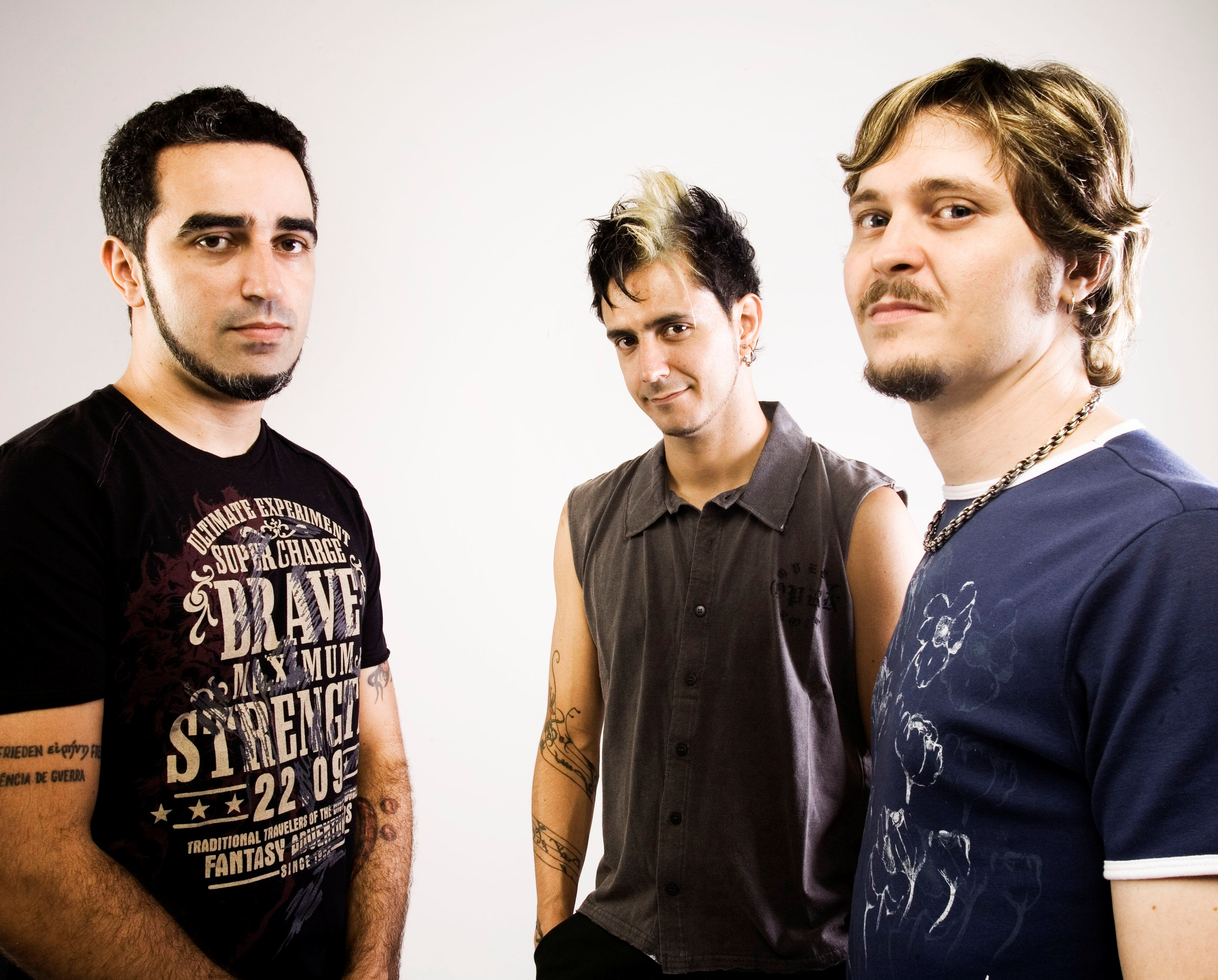 Integrantes da banda Oficina G3 em imagem de divulgação licenciada com licença Creative Commons Atribuição 2.0. A imagem é de autoria do fotógrafo Marcelo Rossi e foi divulgada no Flickr da MGA Assessoria, agência de assessoria da época em que a banda era assessorada pela agência.